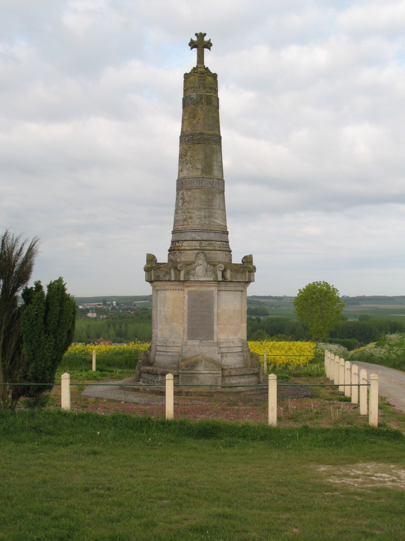 Monument commémoratif de la bataille de l'Hallue; alias "Colonne Faidherbe", érigé sur le territoire de Pont-Noyelles au lieu-dit "La Bahotte", où s'est tenu le général Faidherbe au cours de la bataille.